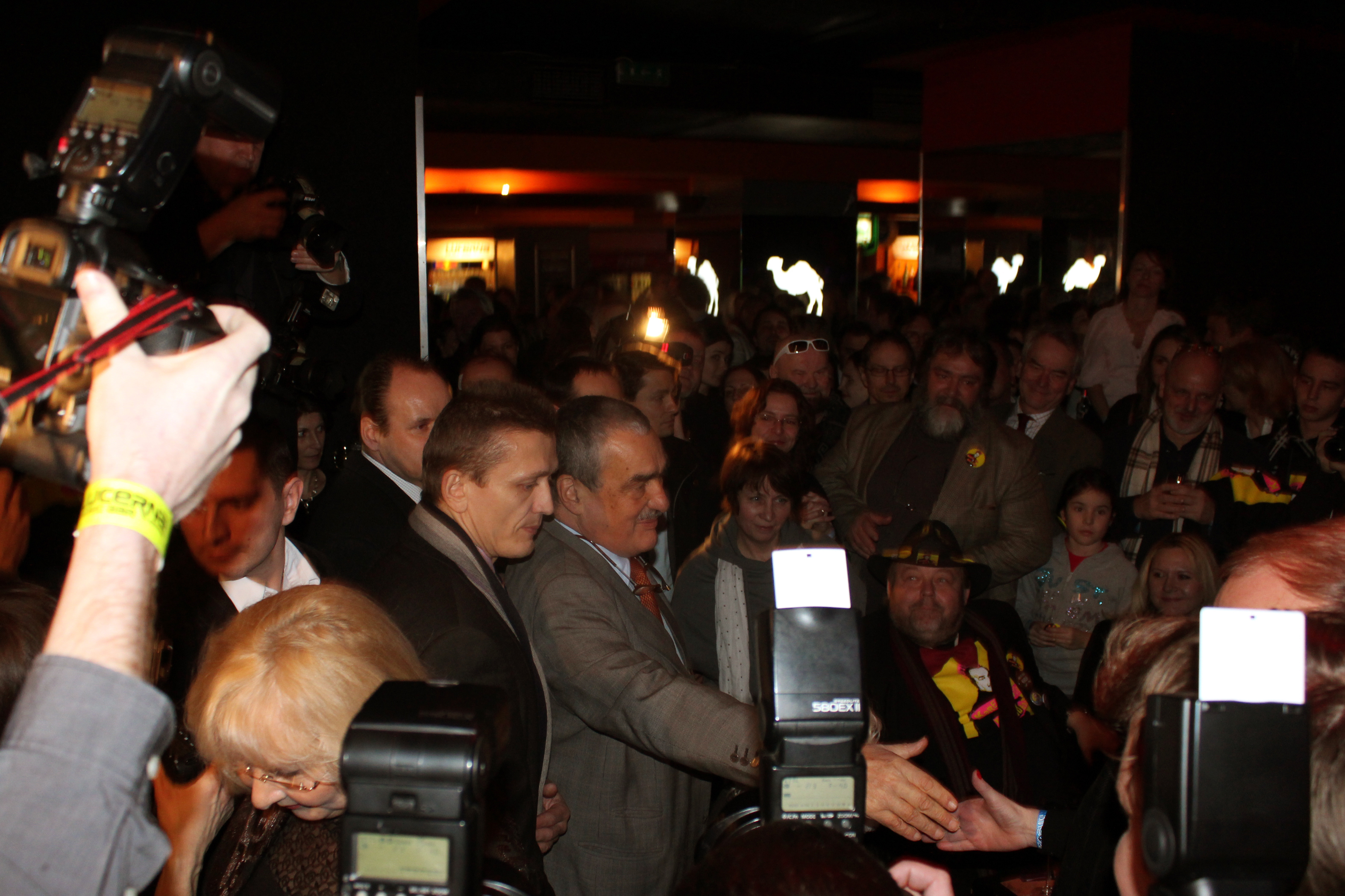 Setkání příznivců Karla Schwarzenberga v závěrečný den voleb. Palác Lucerna.